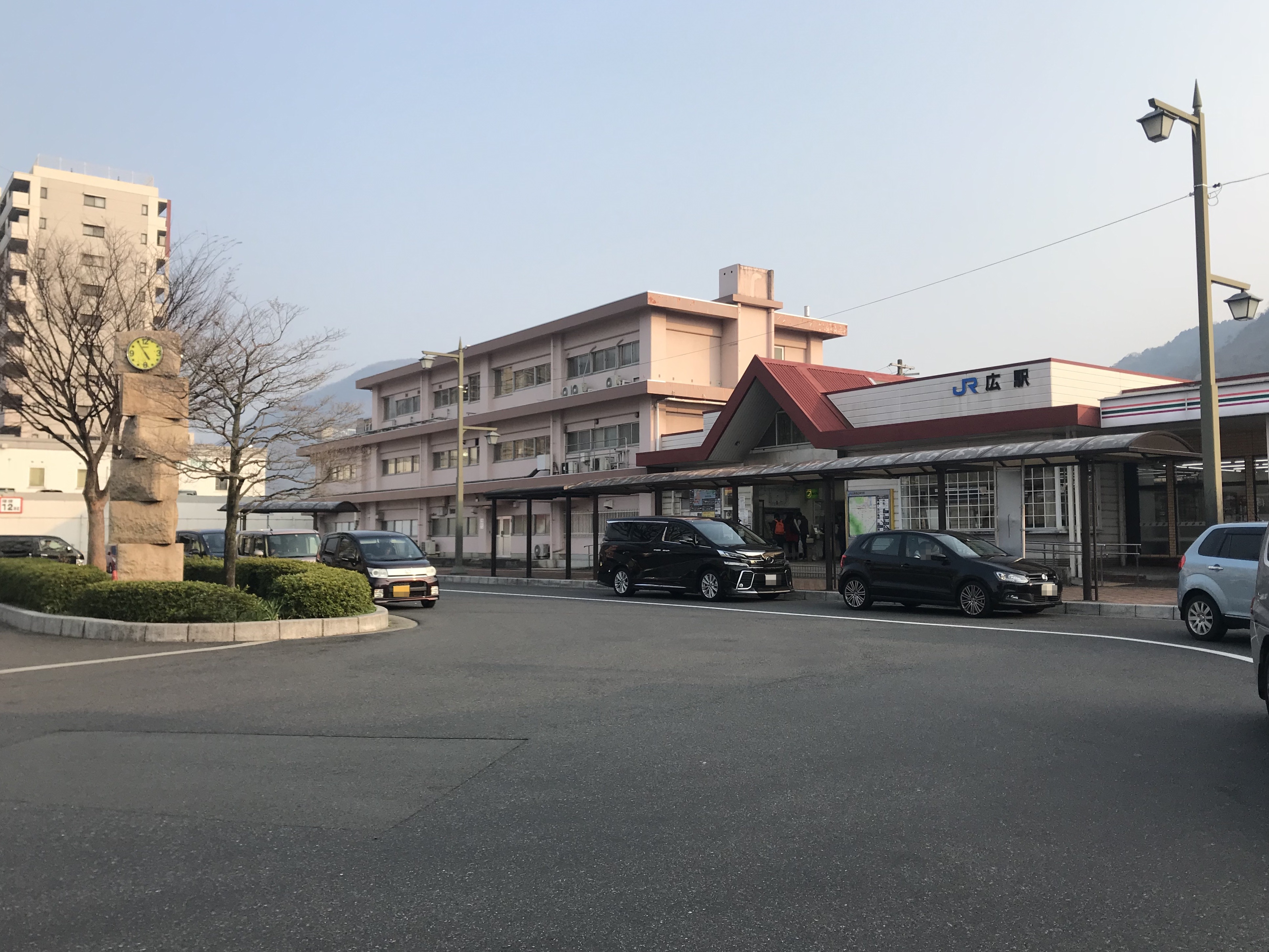 広駅の駅舎と駅前ロータリー